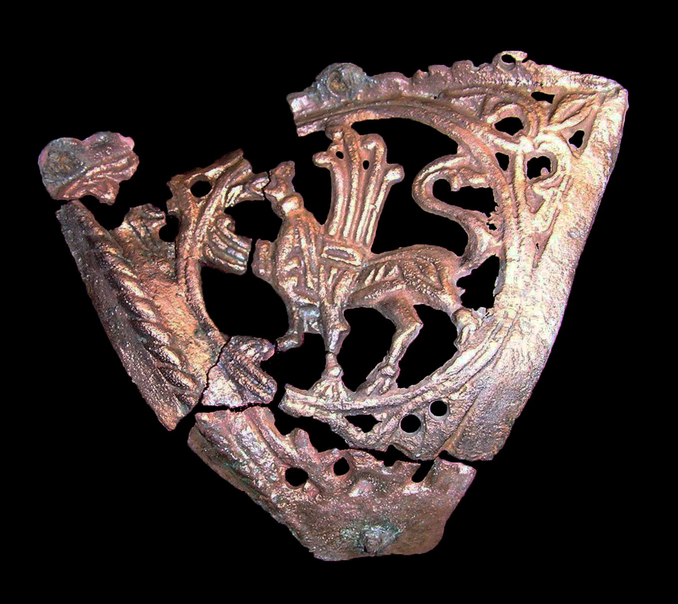 Бронзавая накладка на чару з выявай грыфона